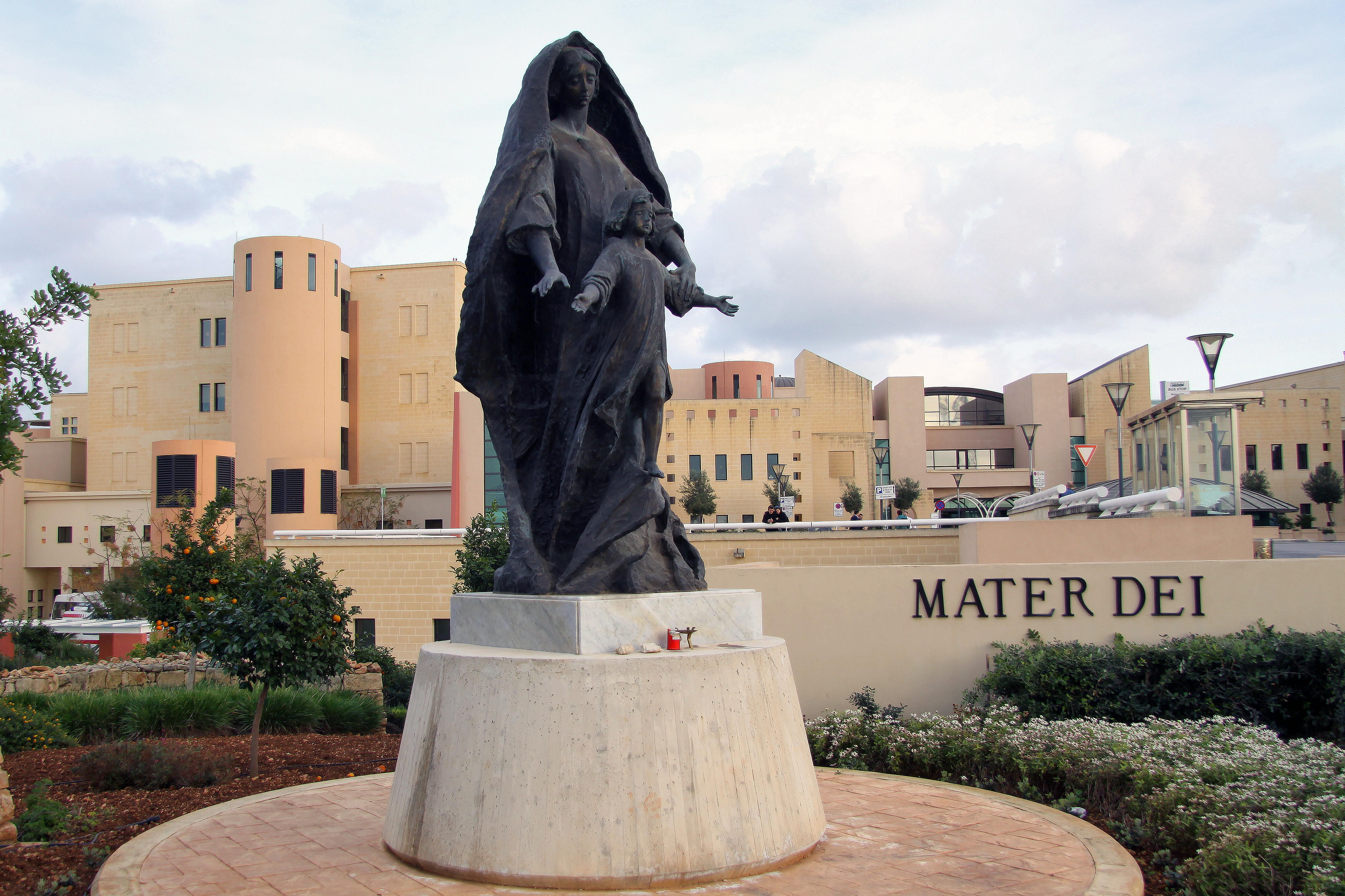 Mater Dei, huvudingången